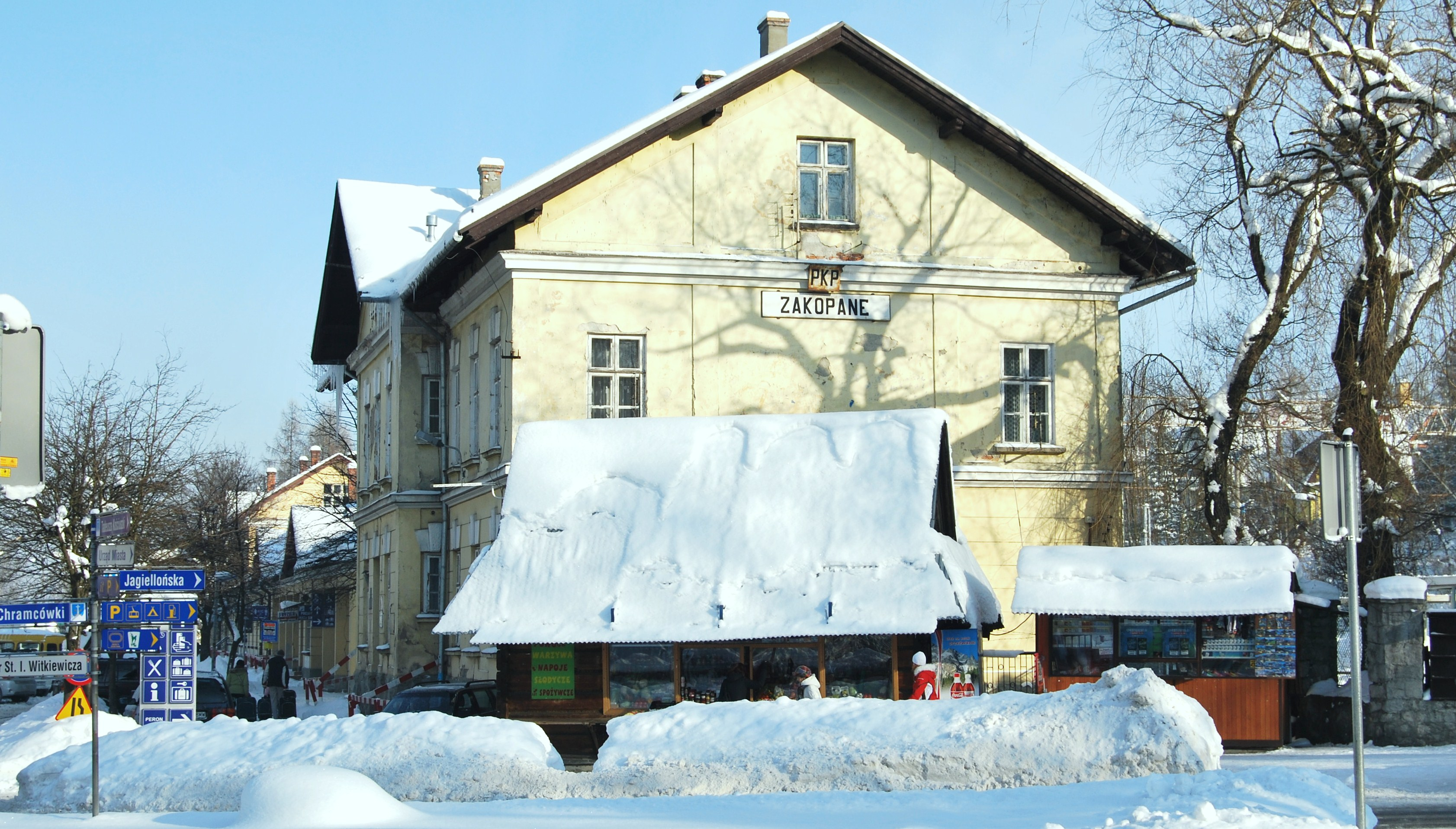 ザコパネ駅 （Zakopane stacja kolejowa）